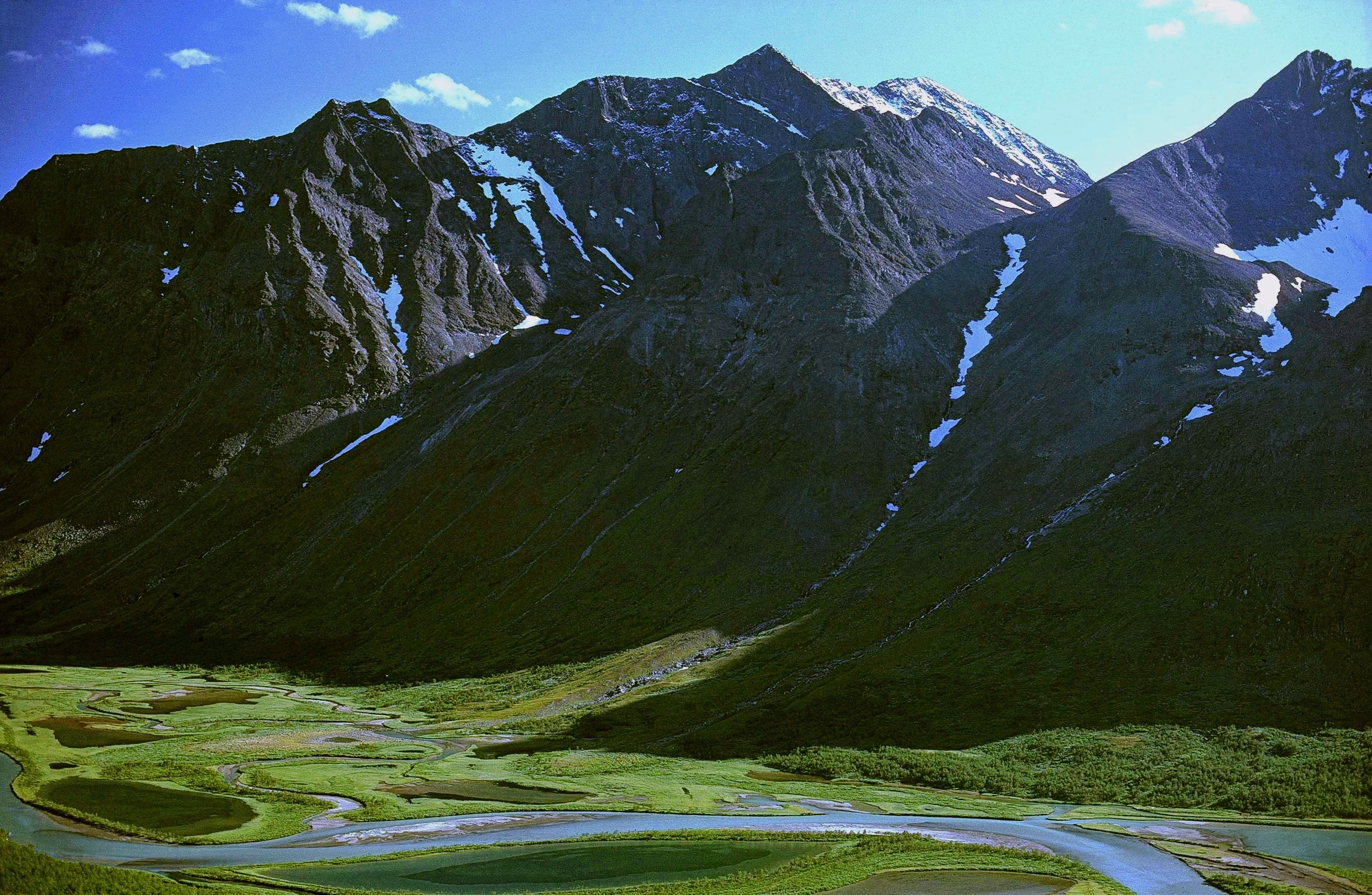 Piellorieppe vid rapaselet i Sarek